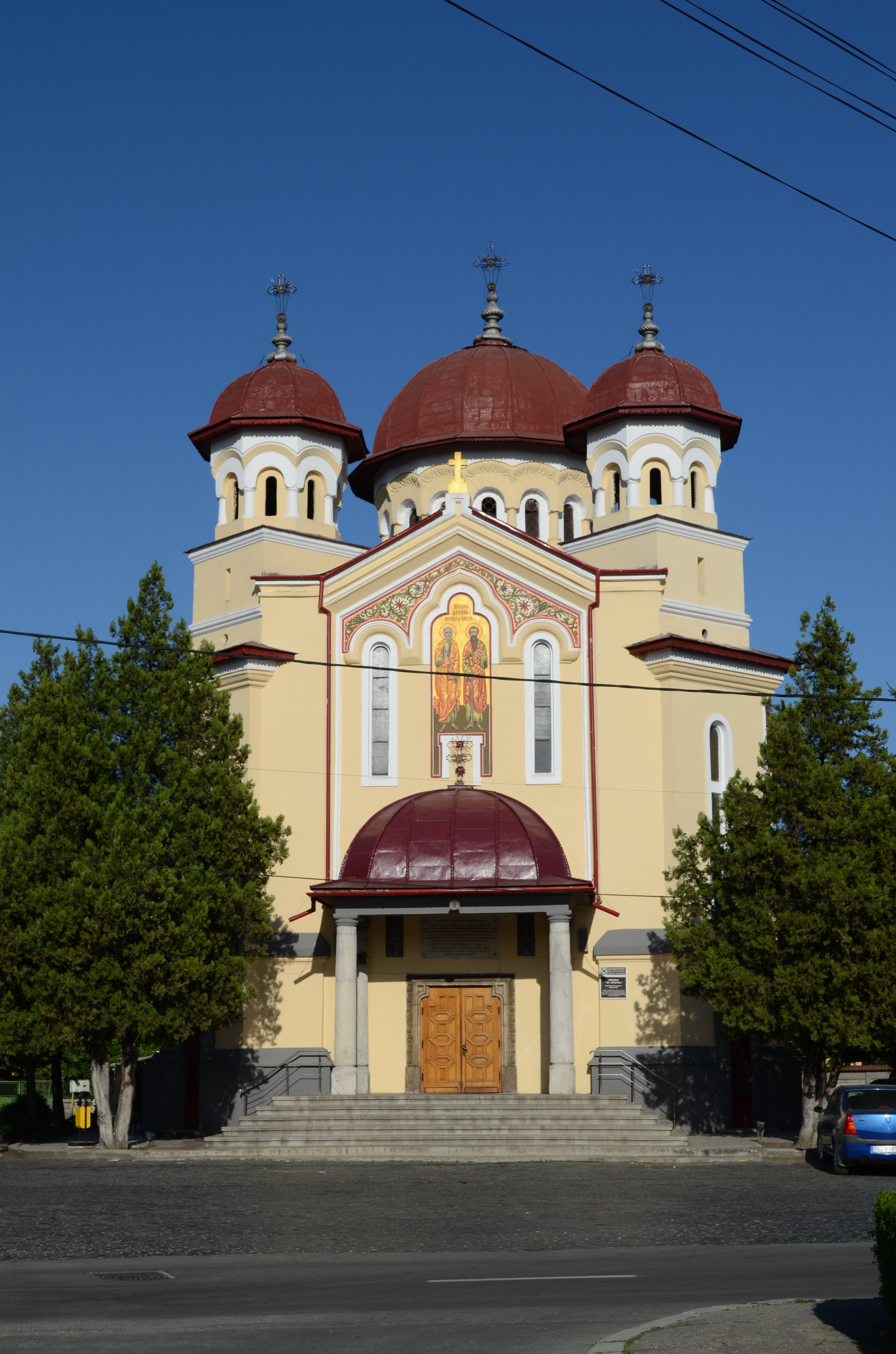 Biserica "Sfinții Apostoli Petru și Pavel", Calea Eroilor, Târgu Jiu